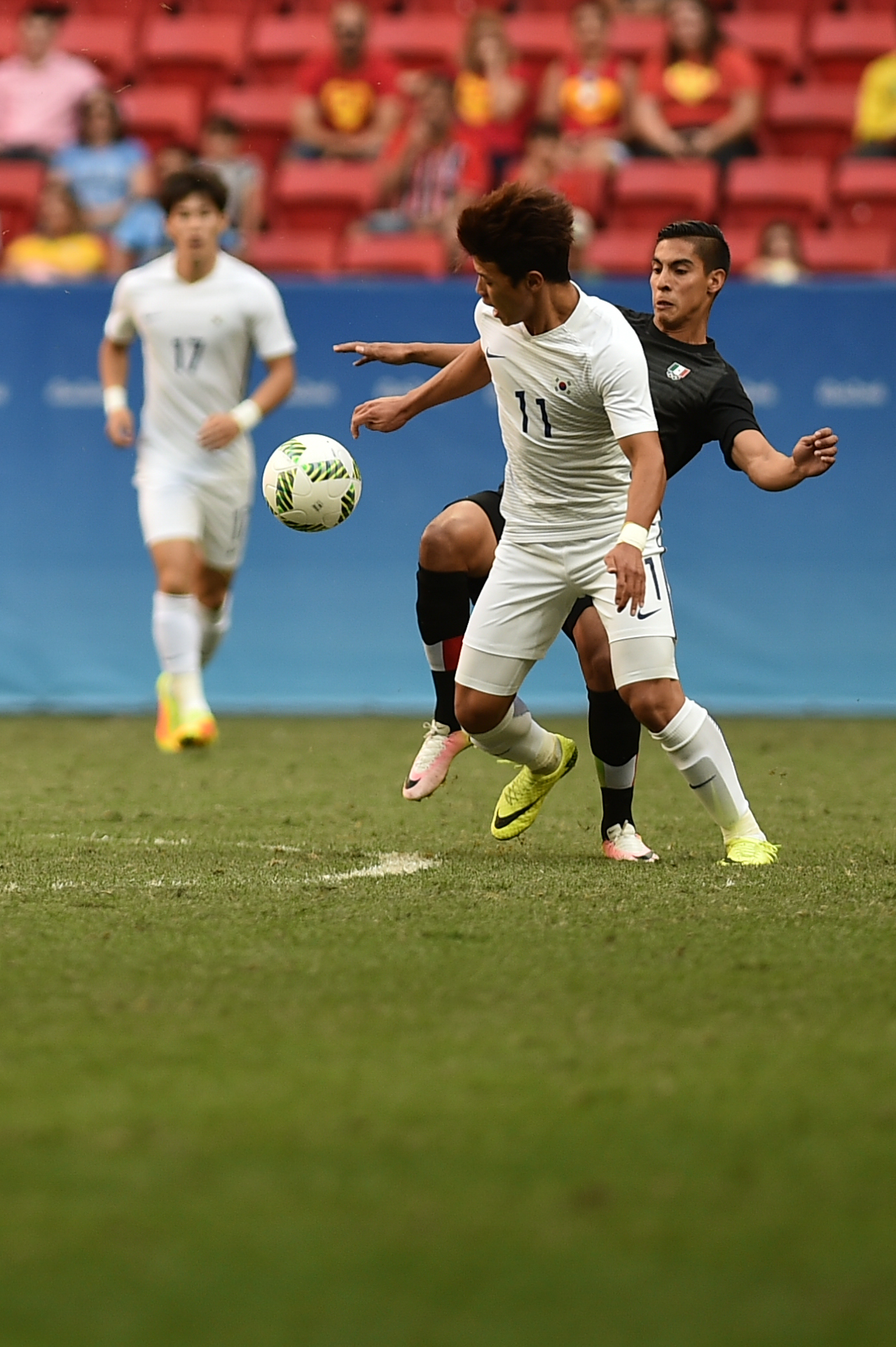 Estádio Nacional de Brasília Mané Garrincha, Brasília, DF, Brasil, 10/8/2016 Foto: Andre Borges/Agência Brasília Coréia do Sul e México jogam nesta quarta-feira (10), no Estádio Mané Garrincha, pelo grupo C do futebol masculino nas Olimpíadas 2016.